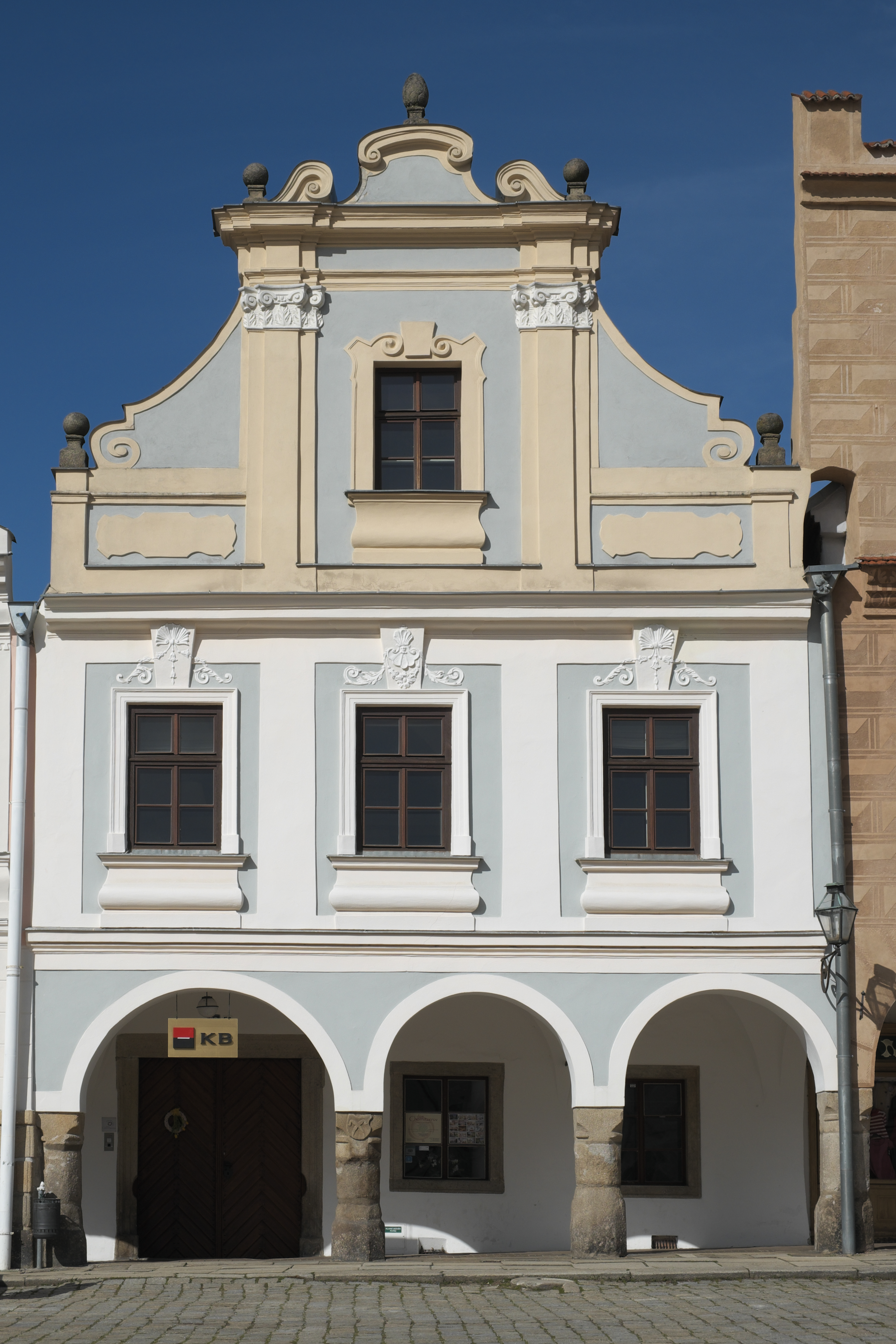 Chornitzer-Haus in Telč im Kraj Vysočina (Tschechien)